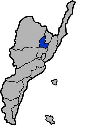 中華民國臺灣省臺東縣關山鎮。KJ (talk)繪製。